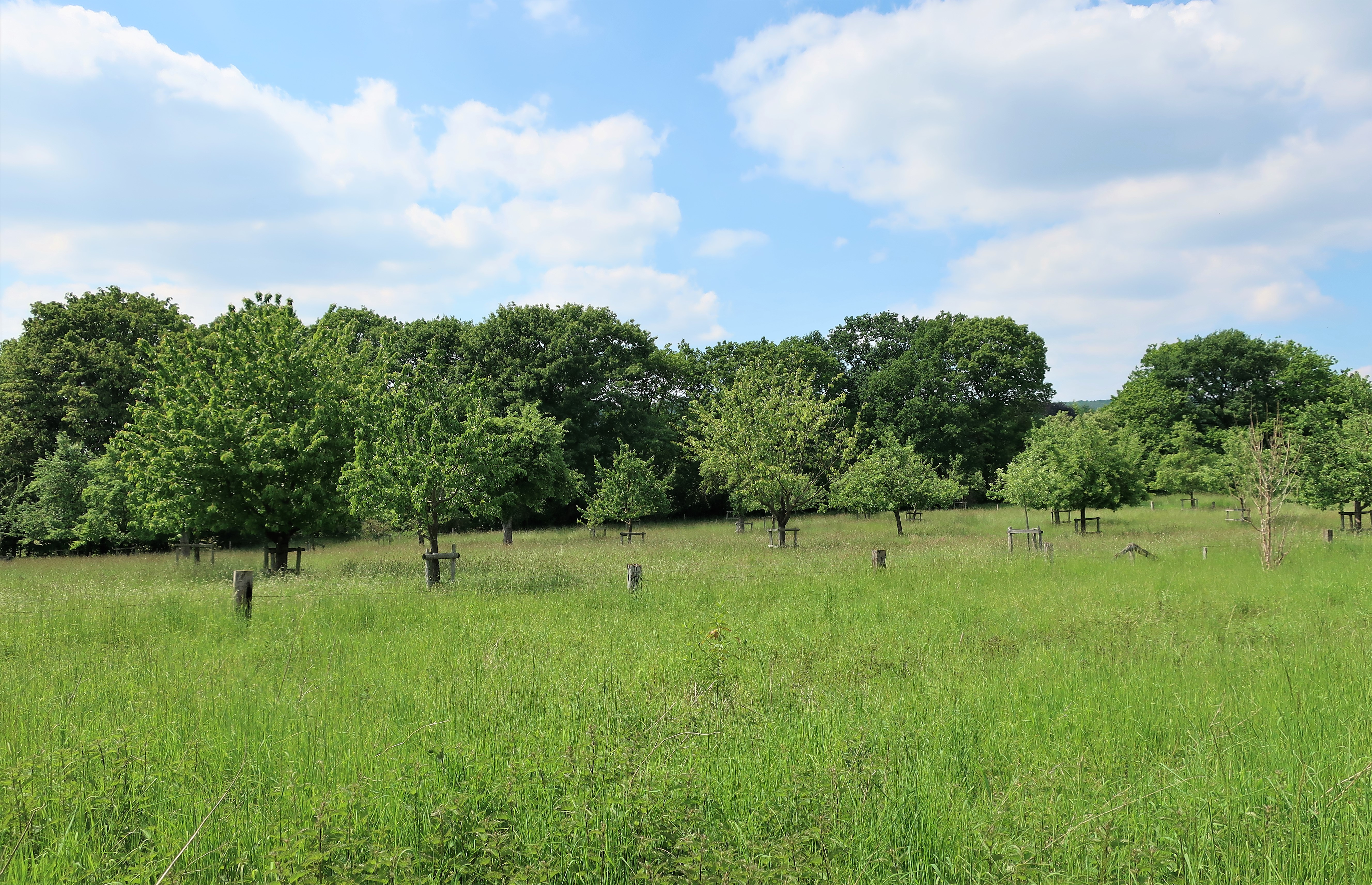 Geschützter Landschaftsbestandteil 1.4.2.7 „Wasserschloss Werdringen“ in Hagen-Vorhalle, westlich vom Kaisberg. Es umfasst eine parkähnliche Anlage mit teilweise verwilderten Gehölzbereichen, Brachflächen, Tümpeln, Bachlauf und Obstwiesen.